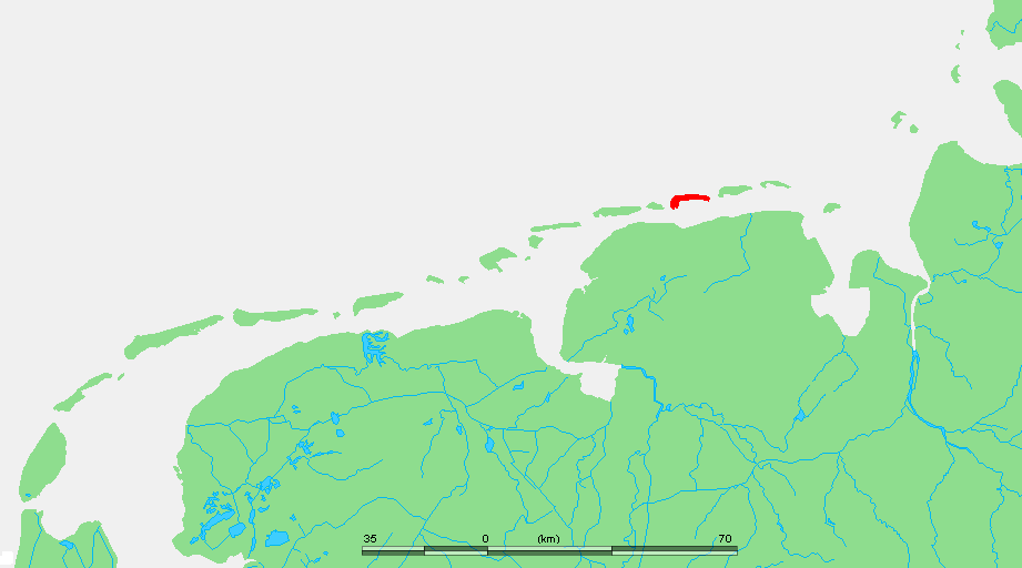 Wadden - Langeoog